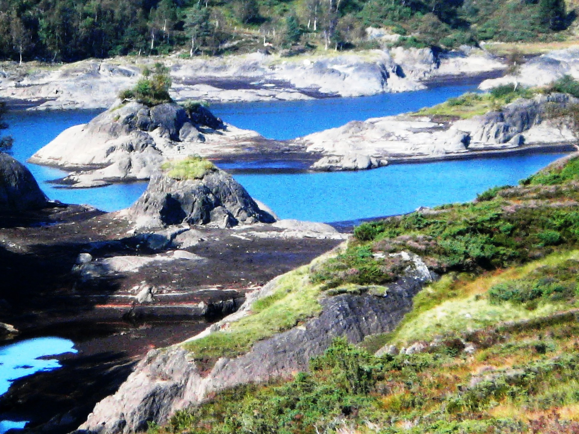 Skulstadvannet